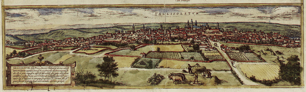 Valladolid